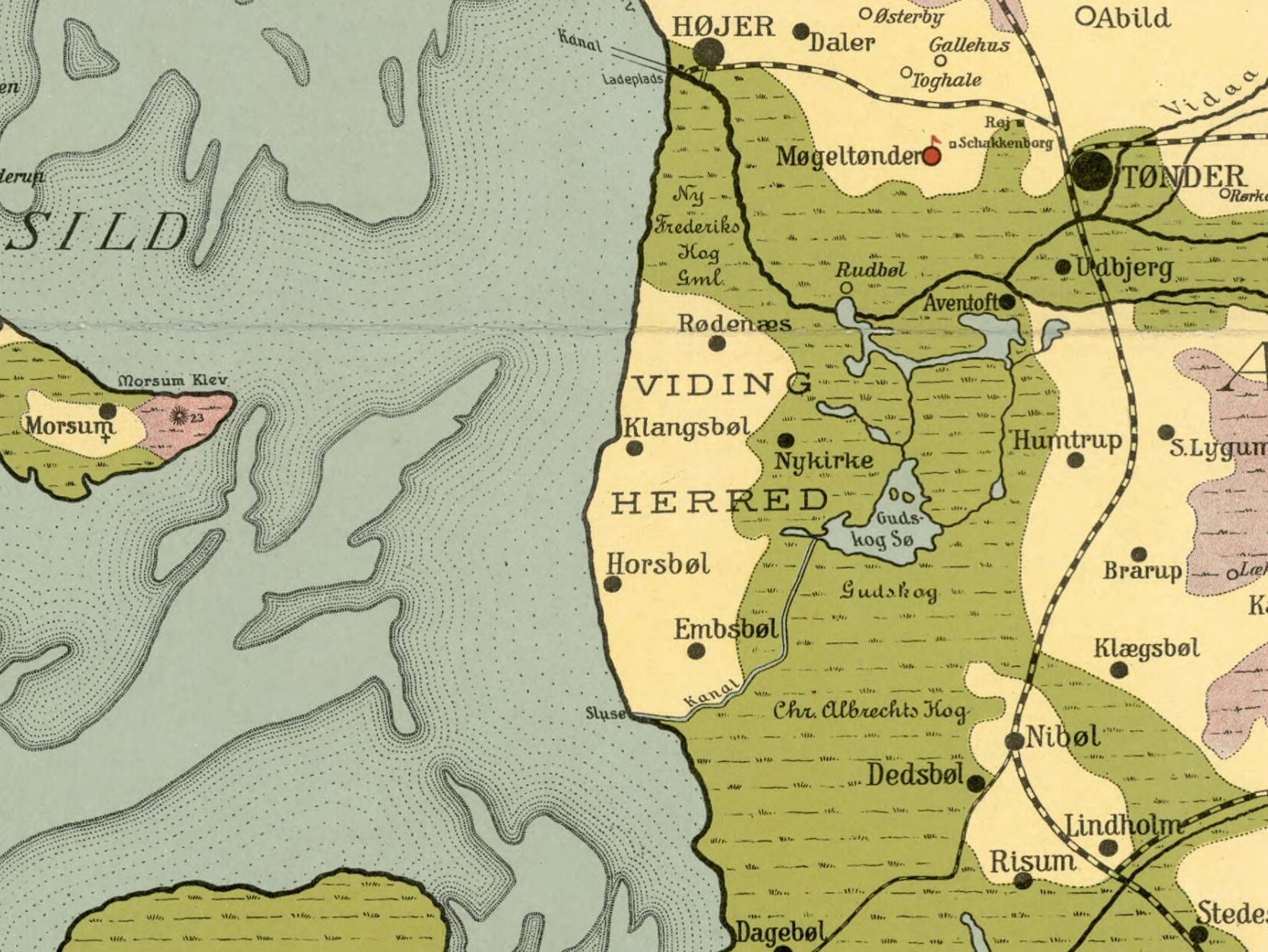 Kort over Viding Herred, Detail fra Gustav Rosendals Sønderjyllandkort med amtsgrænserne fra 1913